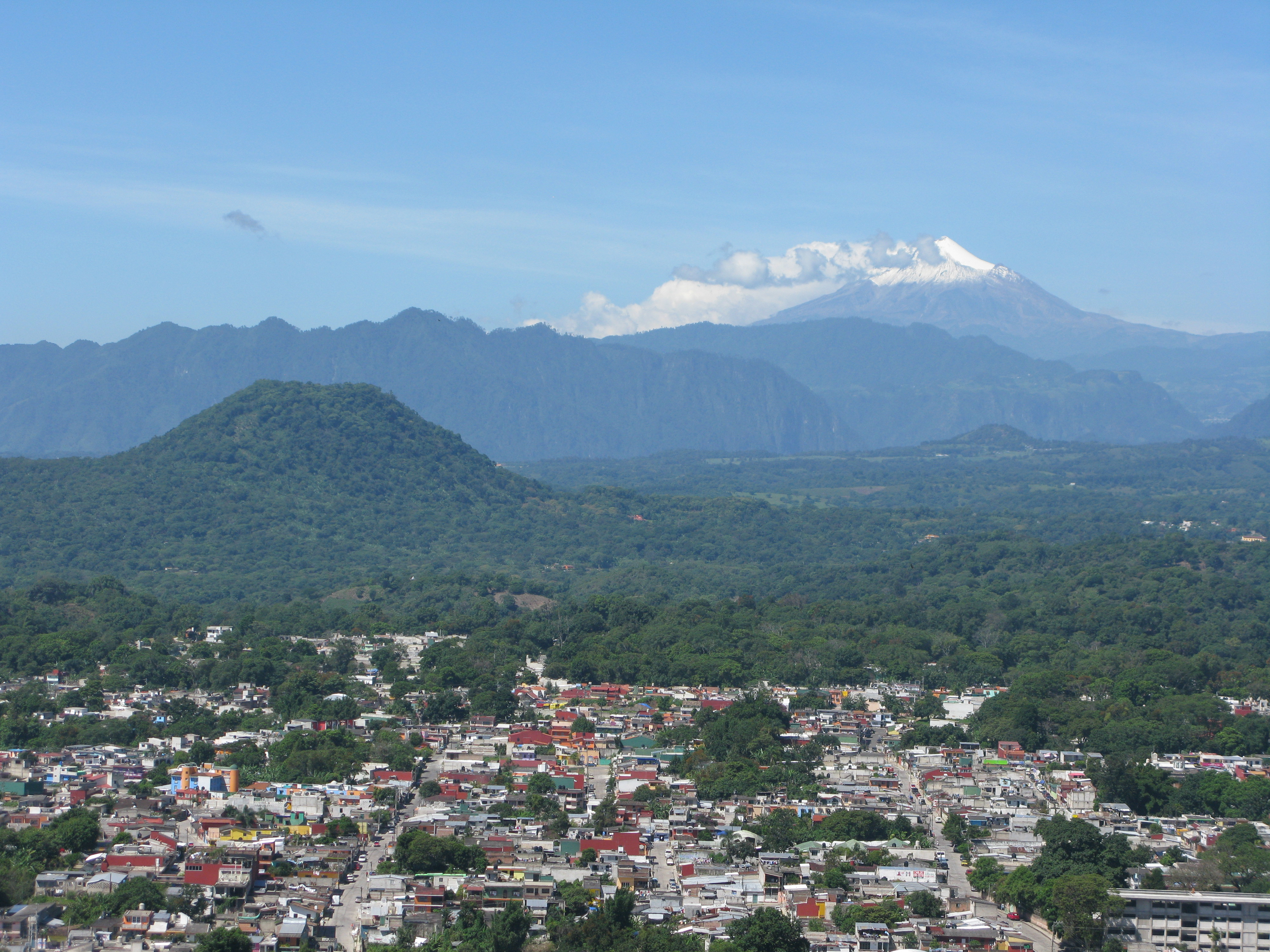 1300msnm